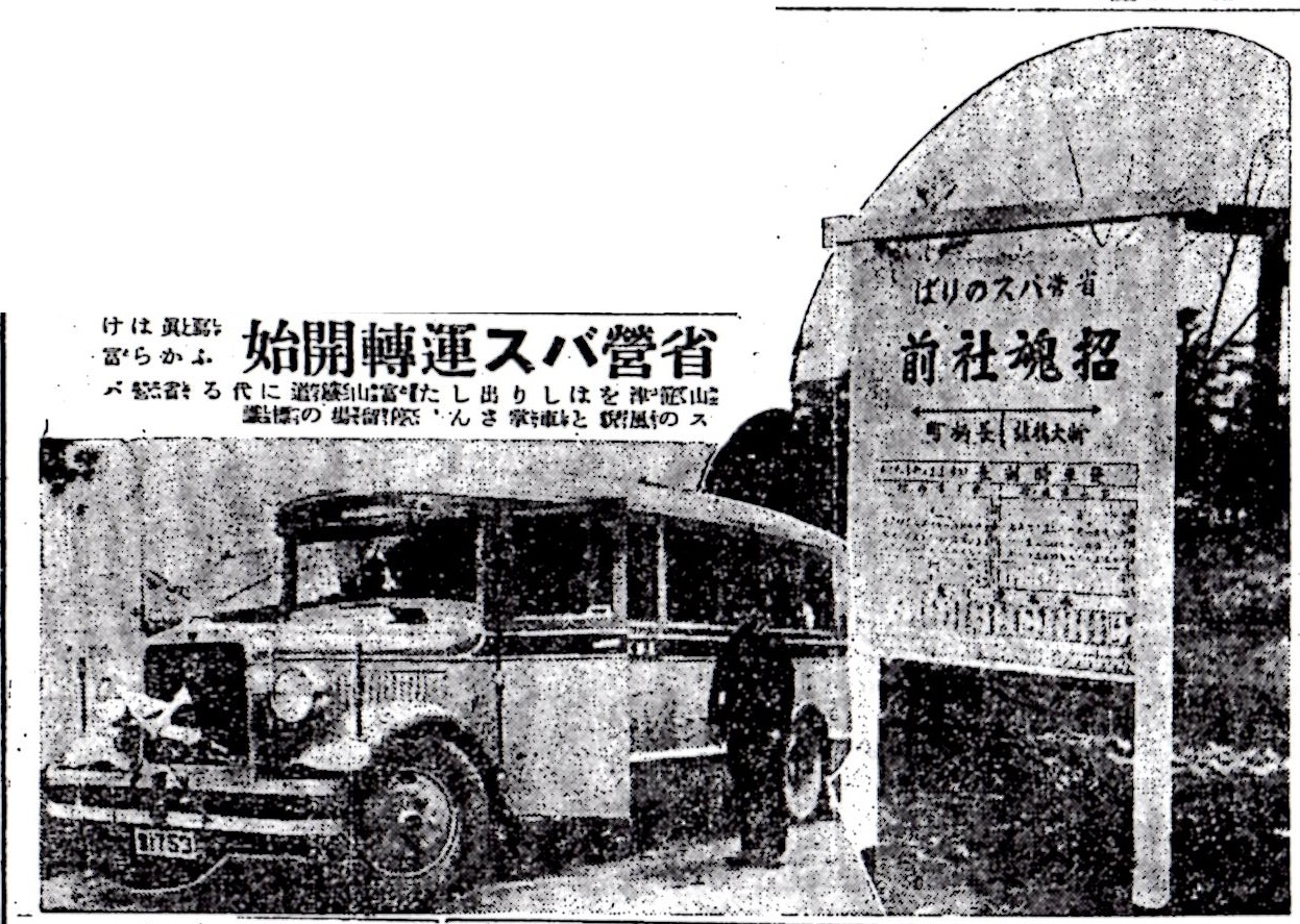 省営バス運転開始